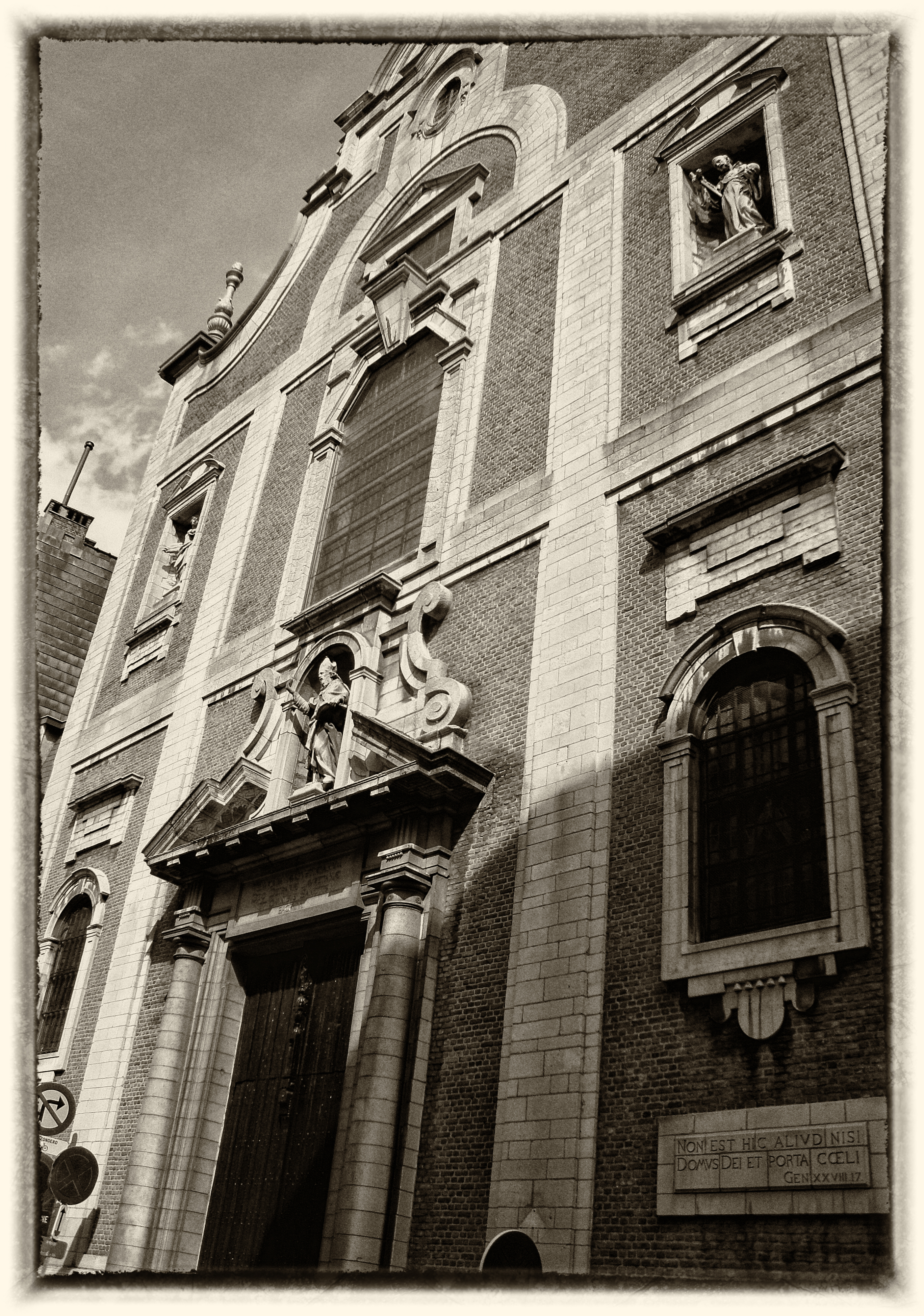 Sint Augustinuskerk, Kammenstraat in Antwerpen